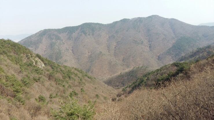 한국어 (조선): 경주시의 단석산에서 촬영한 사진.